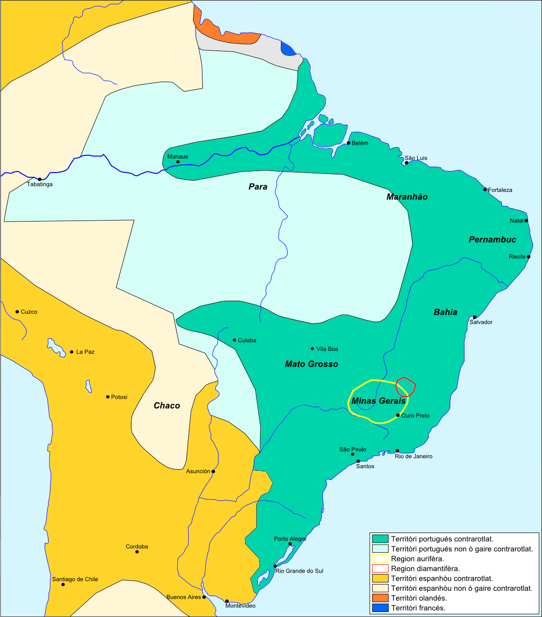 Colonizacion de Brasil vèrs 1790.